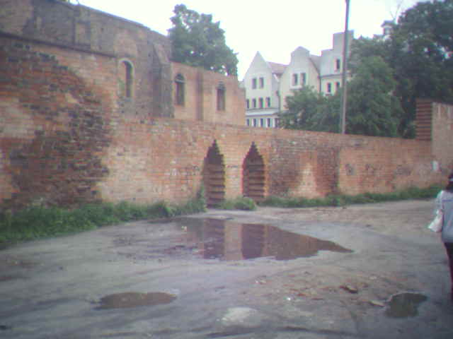 Głogów, fragment murów znajdujący się obok Kościoła Św. Mikołaja